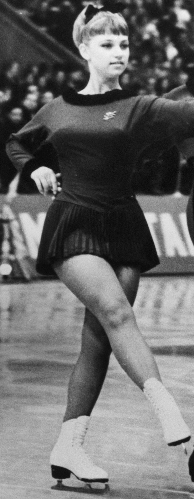 Eva Romanova en Pavel Roman in actie bij het paardansen. Foto is niet van het WK in Colarodo Springs maar van een ander evenement (zie cyrillisch schrift op boarding)